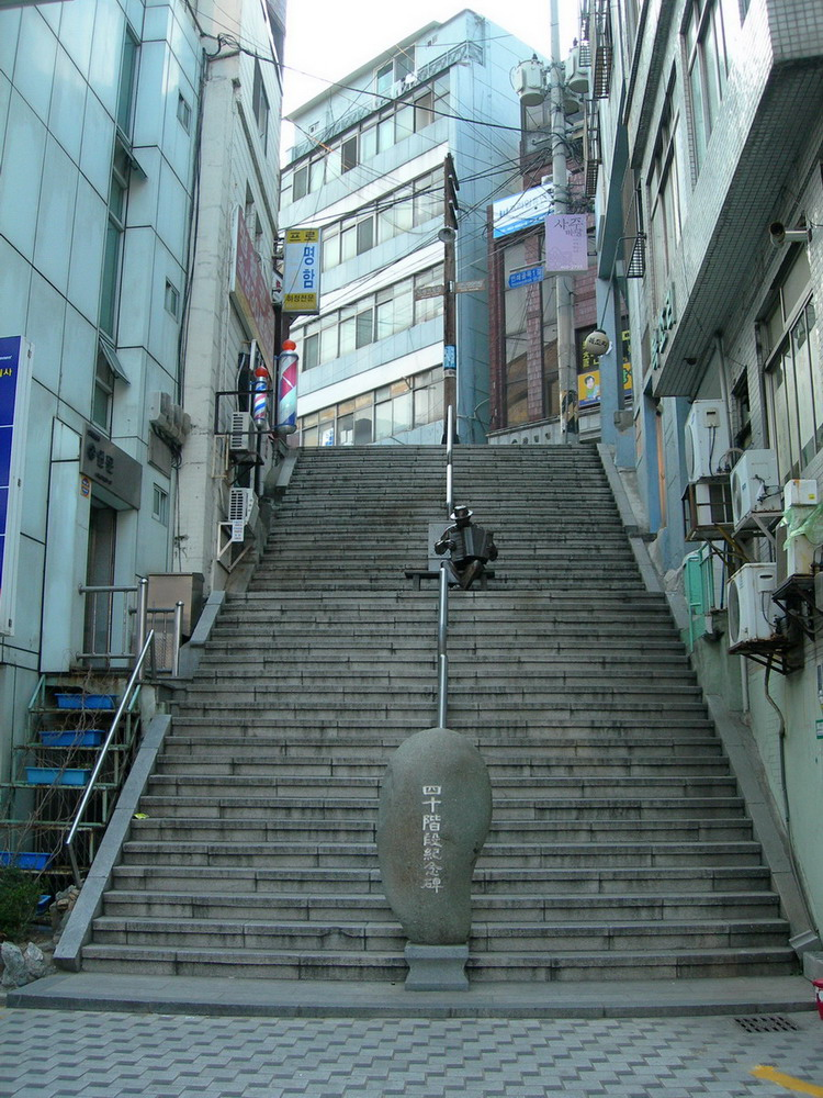 2008 3월 7일 직접촬영한 부산의 40계단